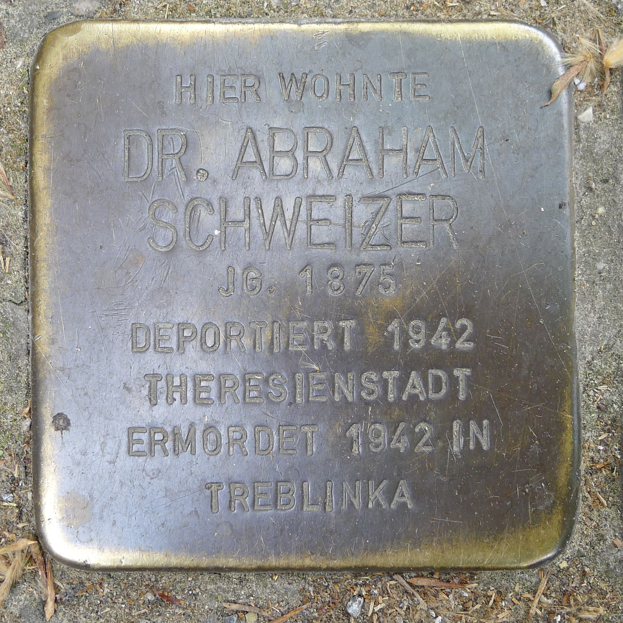 Stolperstein für Abraham Schweitzer, Stuttgart, Gymnasiumstraße 23